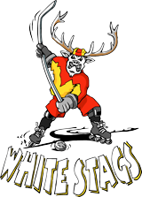 Logo der Inlinehockeyabteilung des SSC Karlsruhe